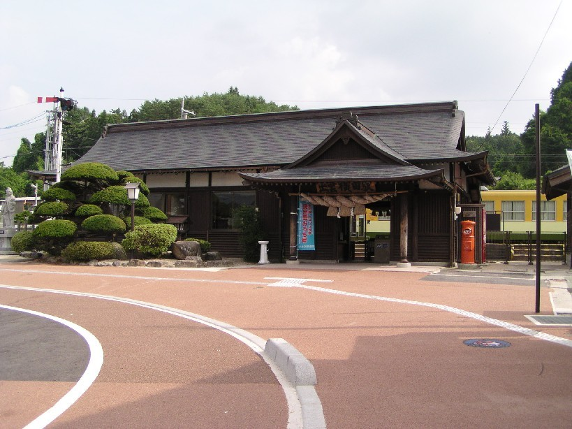 ja:1934年ja:10月竣功のja:西日本旅客鉄道（JR西日本）木次線はja:出雲横田駅のja:駅舎を投稿者が2004年夏に撮影したものです。